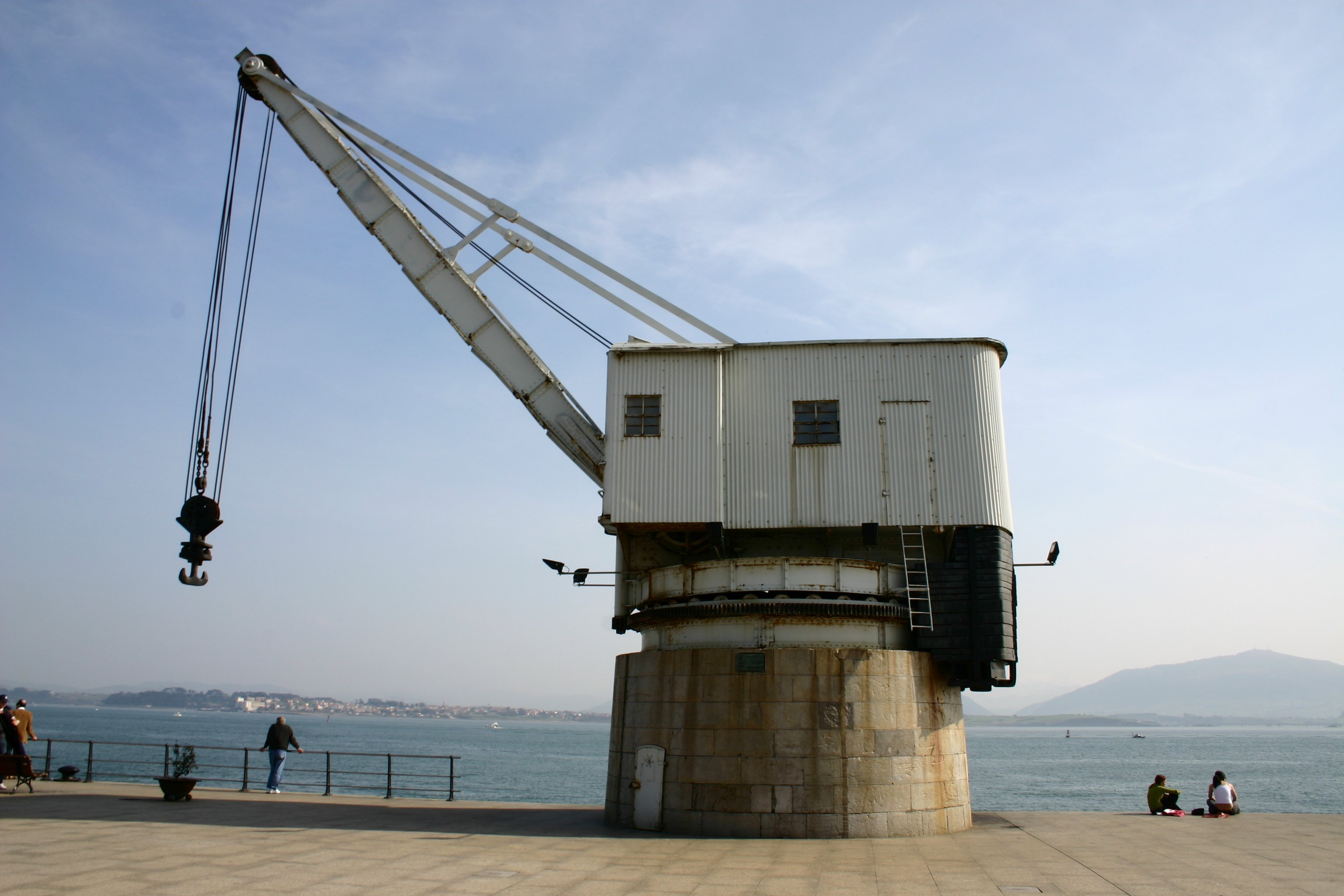 Grúa situada en el antiguo puerto comercial.Se trata de un monumento y ya no está en uso.